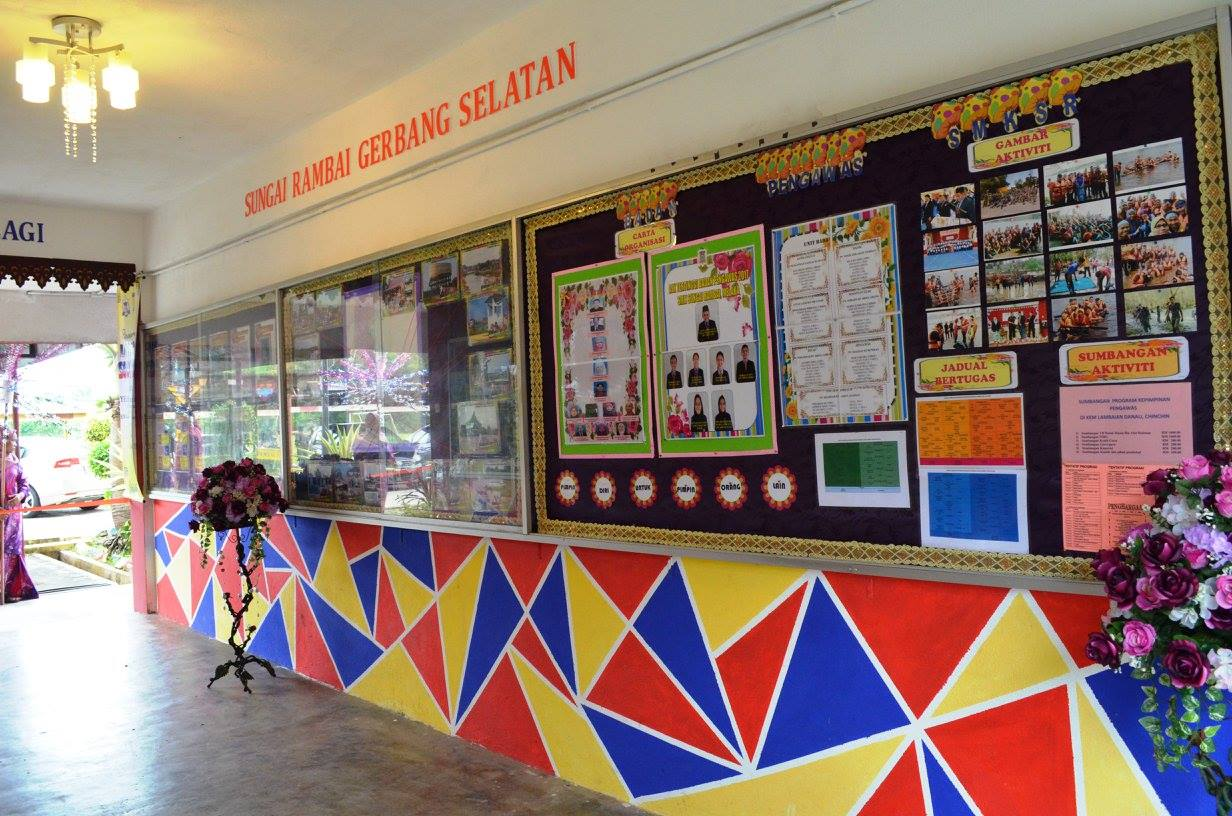 galeri belah kanan